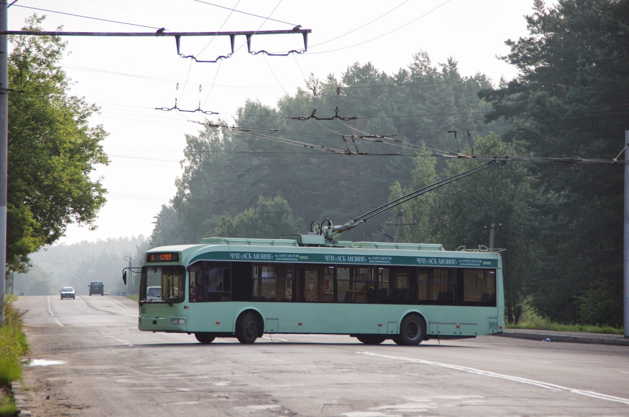 Кiрава, Магілёў, Belarus